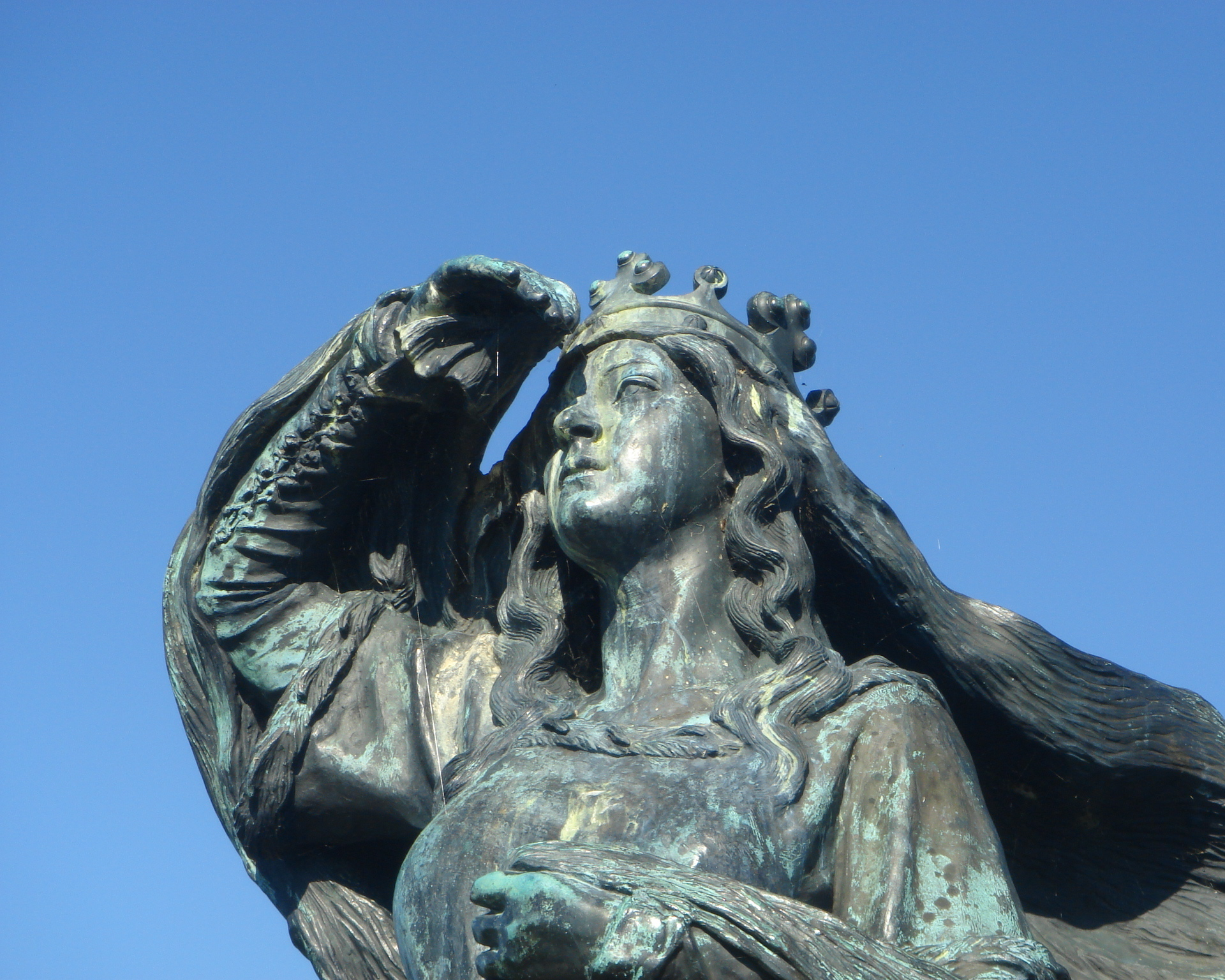 Statue von Dagmar in Ribe (DK)